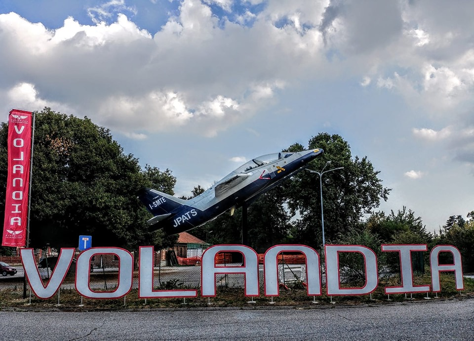 Ingresso museo Volandia con aereo